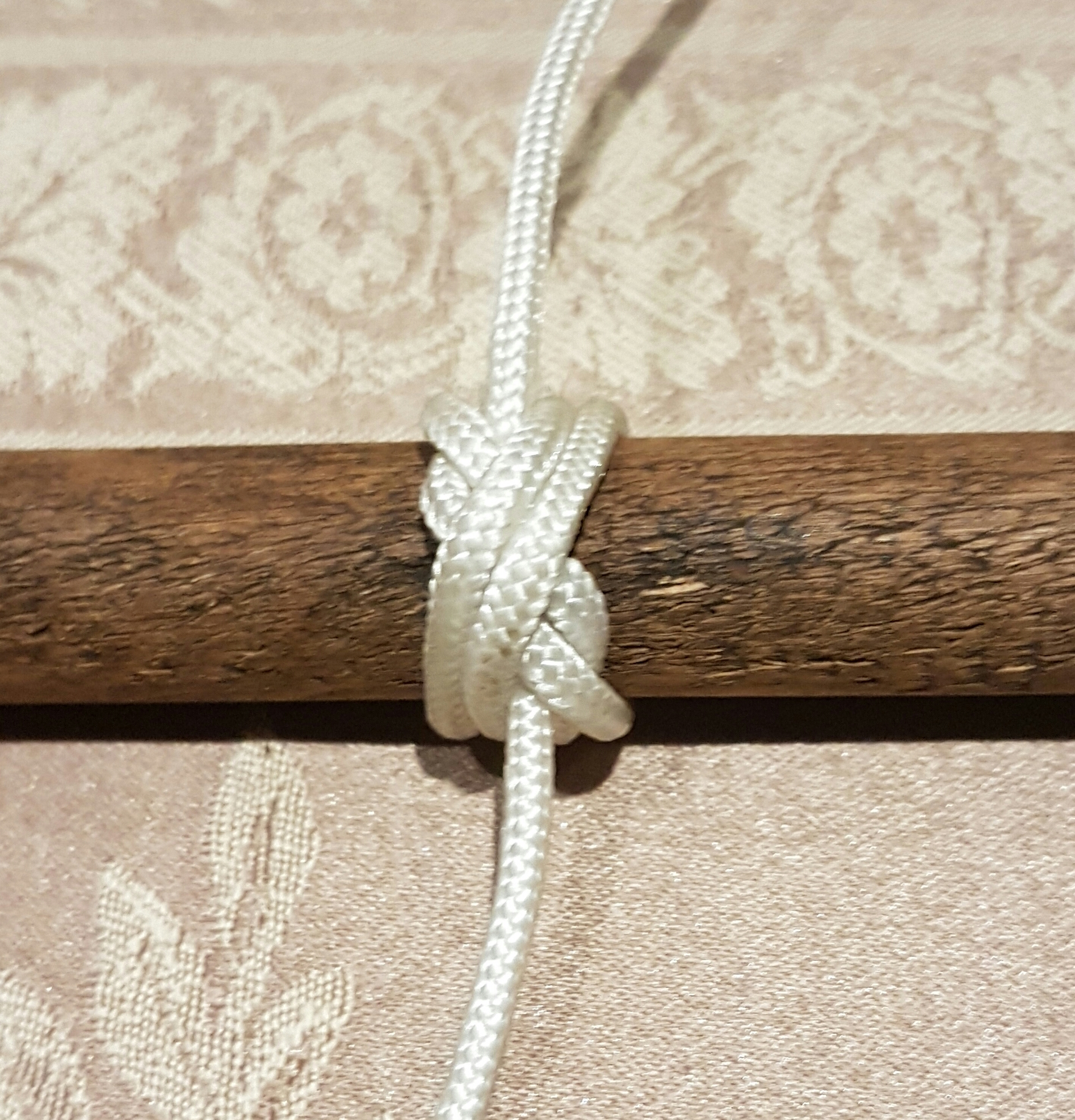 Boaknoop